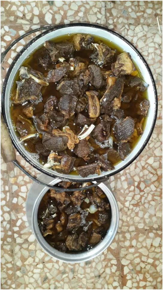 Ət qovurması.